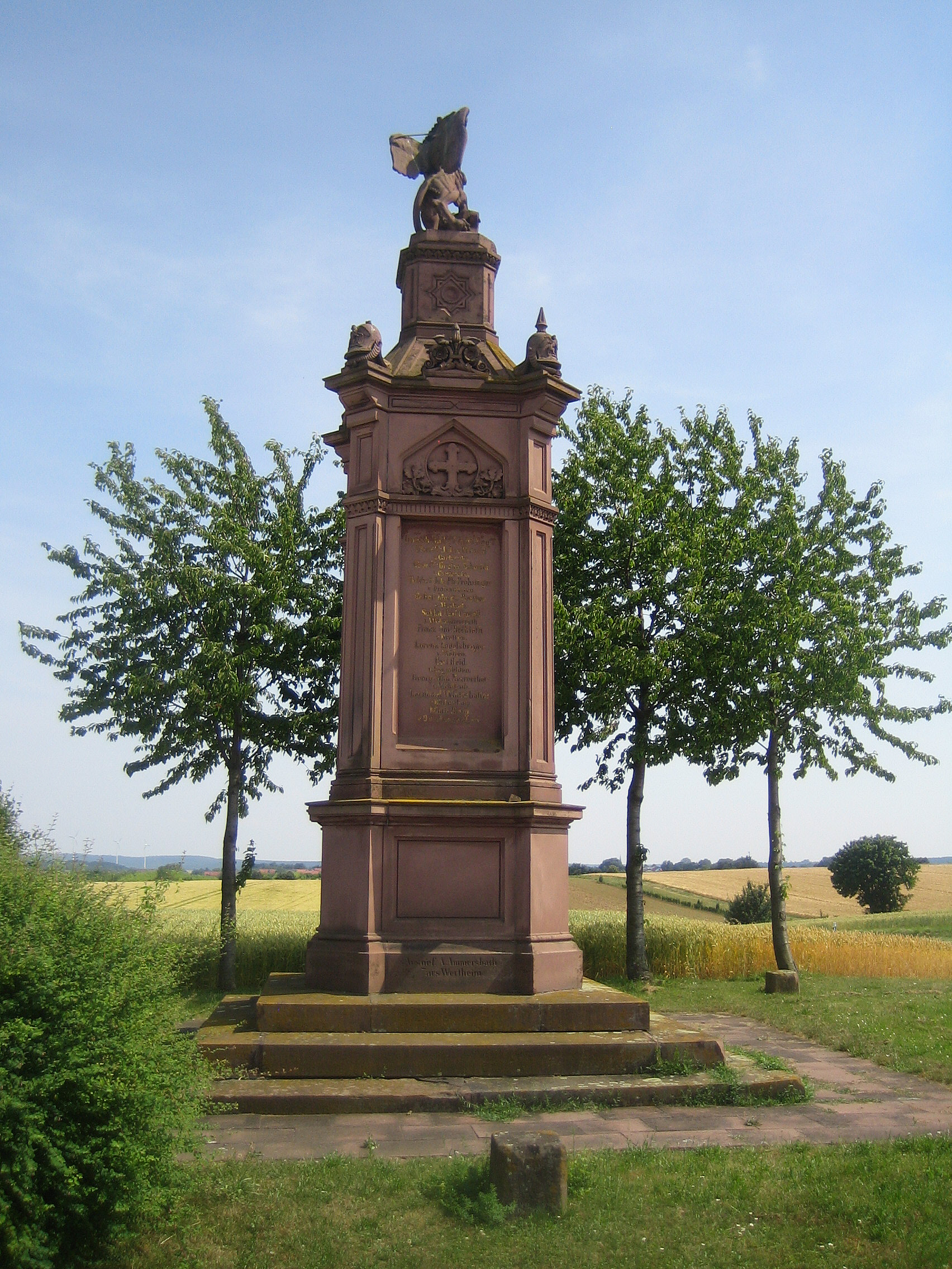 Denkmal für die im Gefecht bei Hundheim am 23. Juli 1866 gefallenen badischen Soldaten; das Denkmal wurde von A. Ammersbach aus Wertheim 1867 in Sandstein ausgeführt. Auf zwei Seiten des Denkmals sind Namen, Herkunftsort und Truppeneinheit von insgesamt 21 im Gefecht gefallenen oder im Nachgang an den Verletzungen verstorbenen Soldaten aufgeführt.